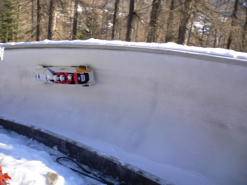 I campioni olimpici capitanati da Pierre Lueders, lanciati nei Labirinti, prova di coppa del mondo di bob a 4, Cortina d'Ampezzo.